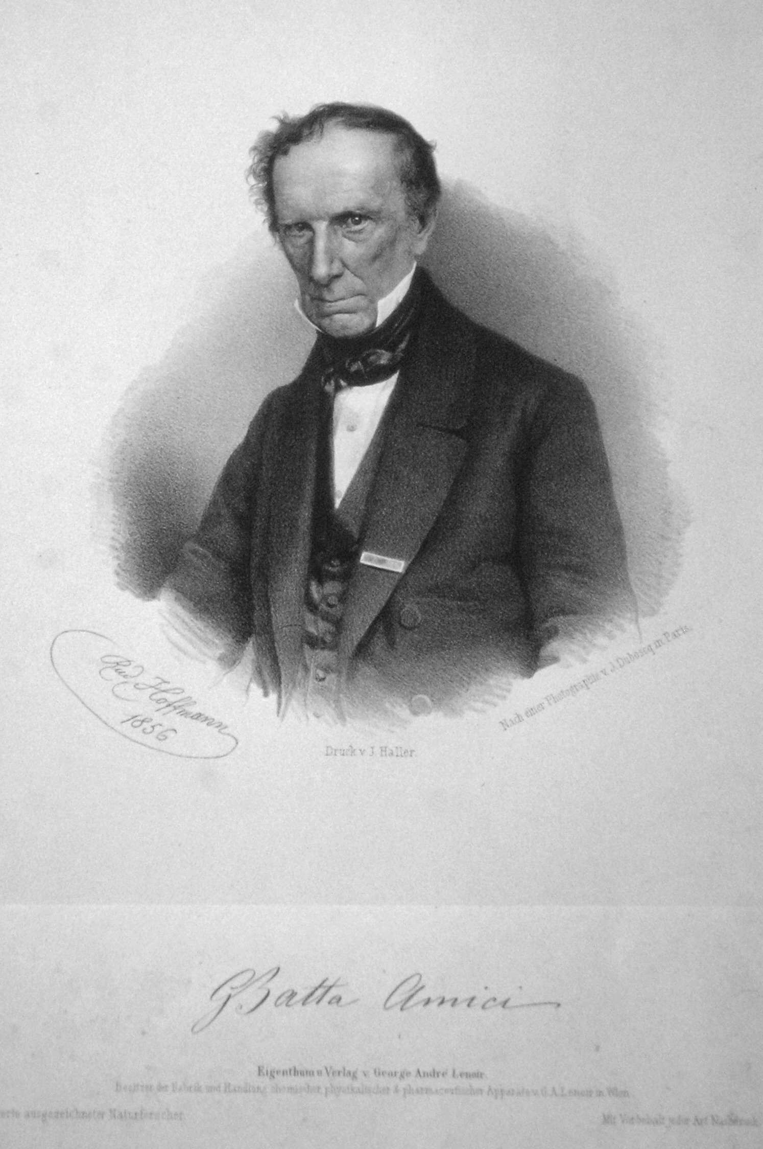 Giuovanni Battista Amici (1786-1863), italienischer Astronom und Optiker. Lithographie von Rudolf Hoffmann, 1856. Nach einer Photographie von Duboscq (Paris)